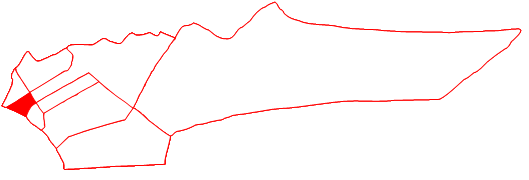 Ubicación de la parroquia Carmen Herrera en el municipio Cabimas, estado Zulia, Venezuela